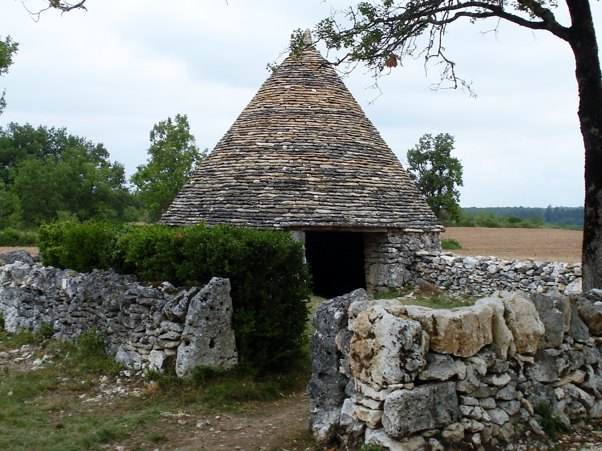 La cabane de Nouel à Lalbenque, ancienne bergerie en pierre sèche accueillant une quinzaine de bêtes